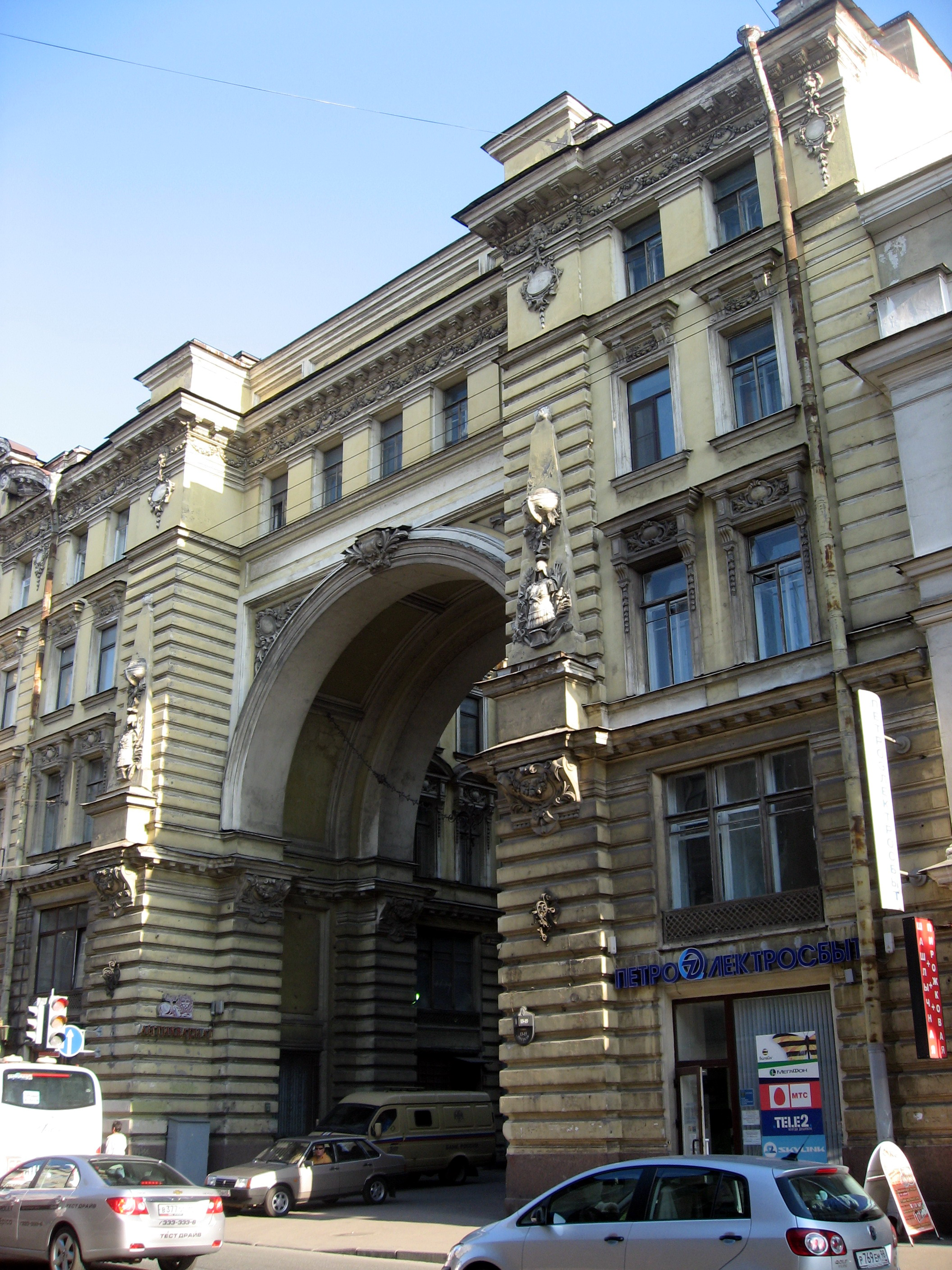 Sankt-Petěrburg